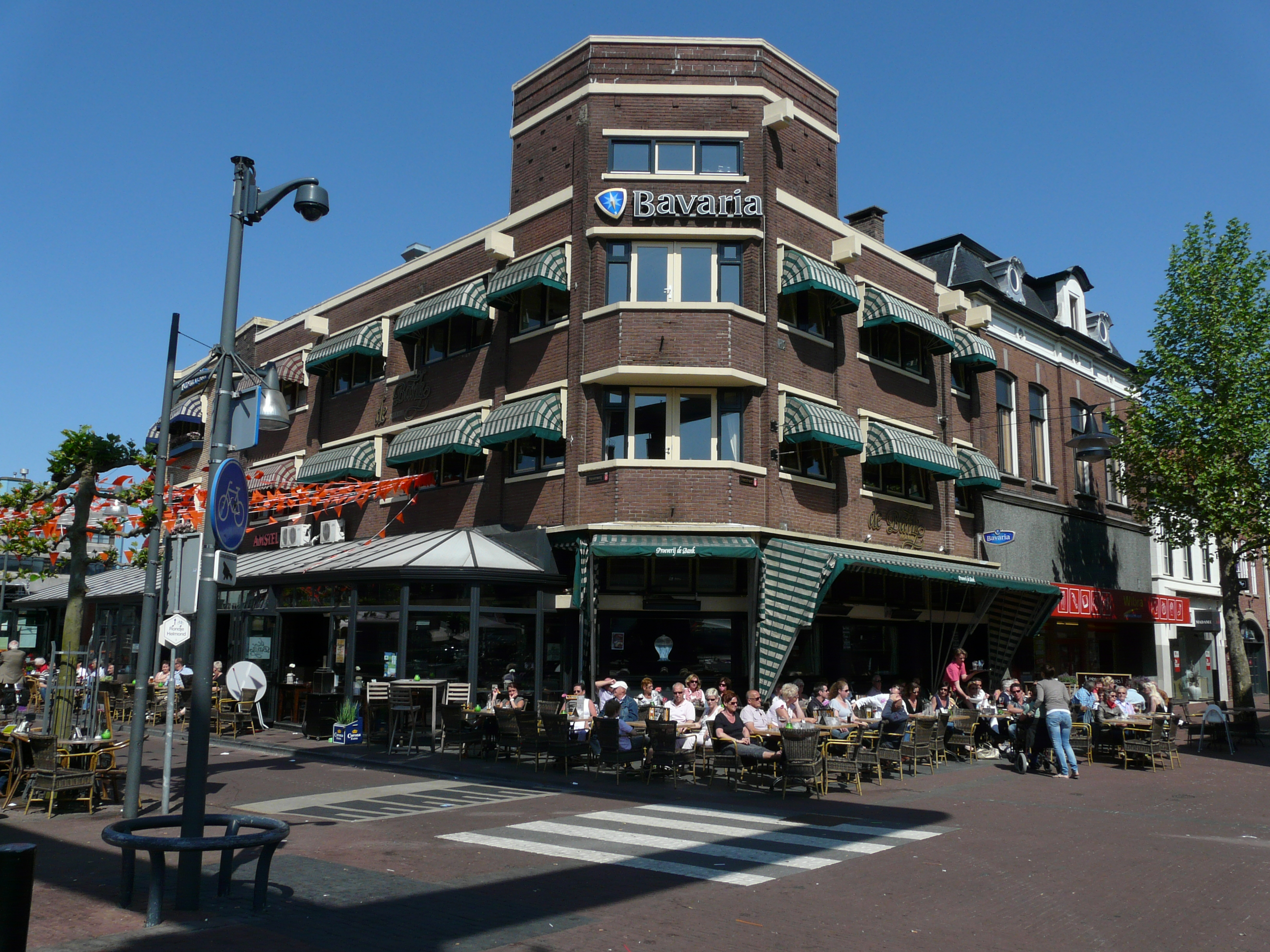 Horeca-gelegenheid in het centrum van Helmond